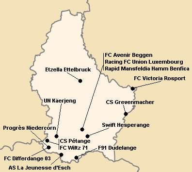 Répartition des clubs en Division Nationale 2007-2008.